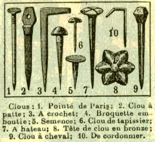 Photo de divers clous anciens